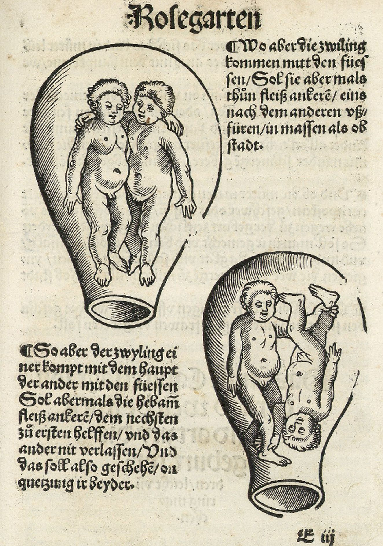 Eucharius Rösslin: Der schwangeren Frauen und Hebammen Rosengarten. Straßburg: Martin Flach, 1513.